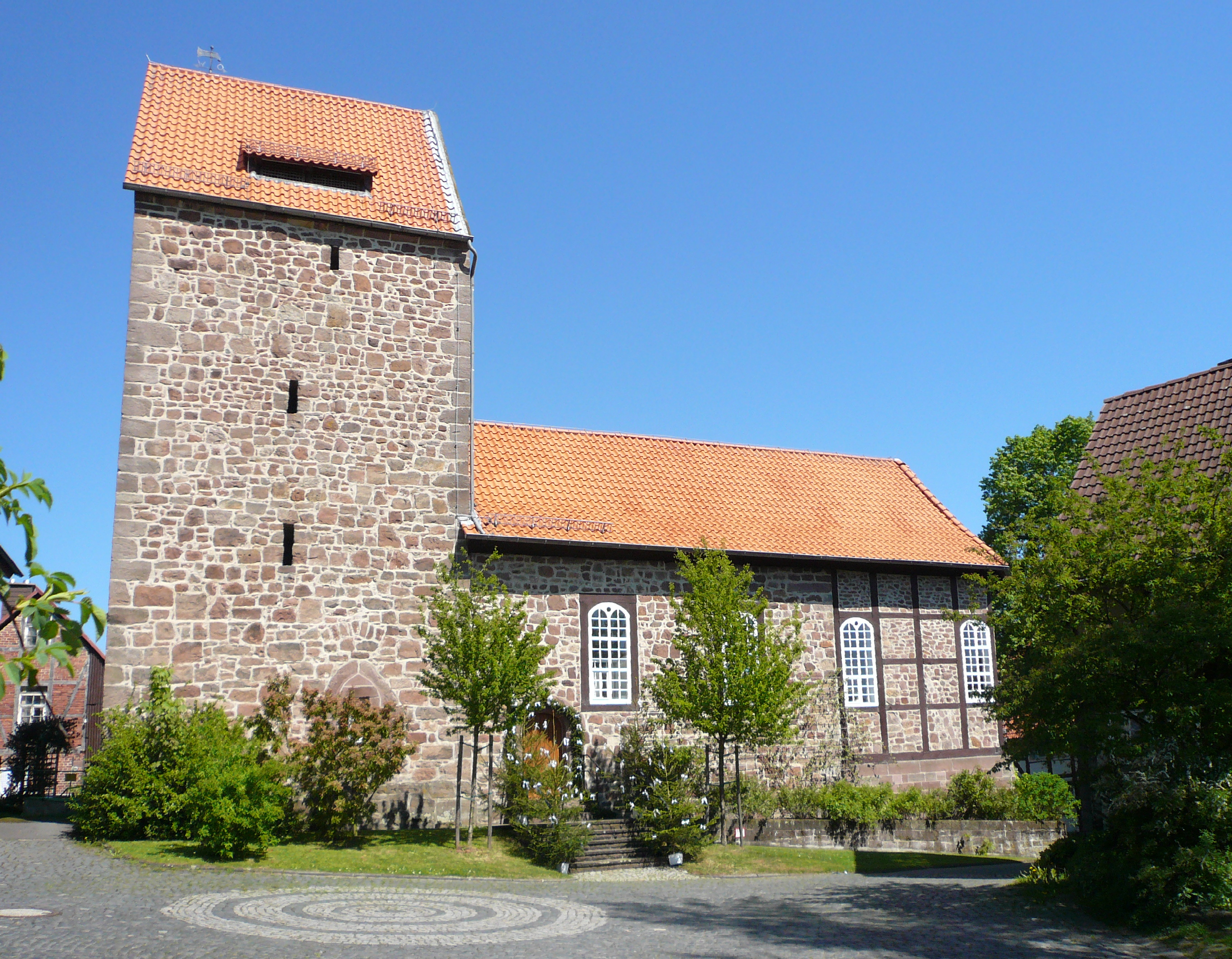 Ev. Kirche St. Laurentius in Hardegsen-Trögen, Landkreis Northeim, Niedersachsen. Mittelalterlicher Turm, Kirchenschiff 1596, Fachwerkchor 1766.